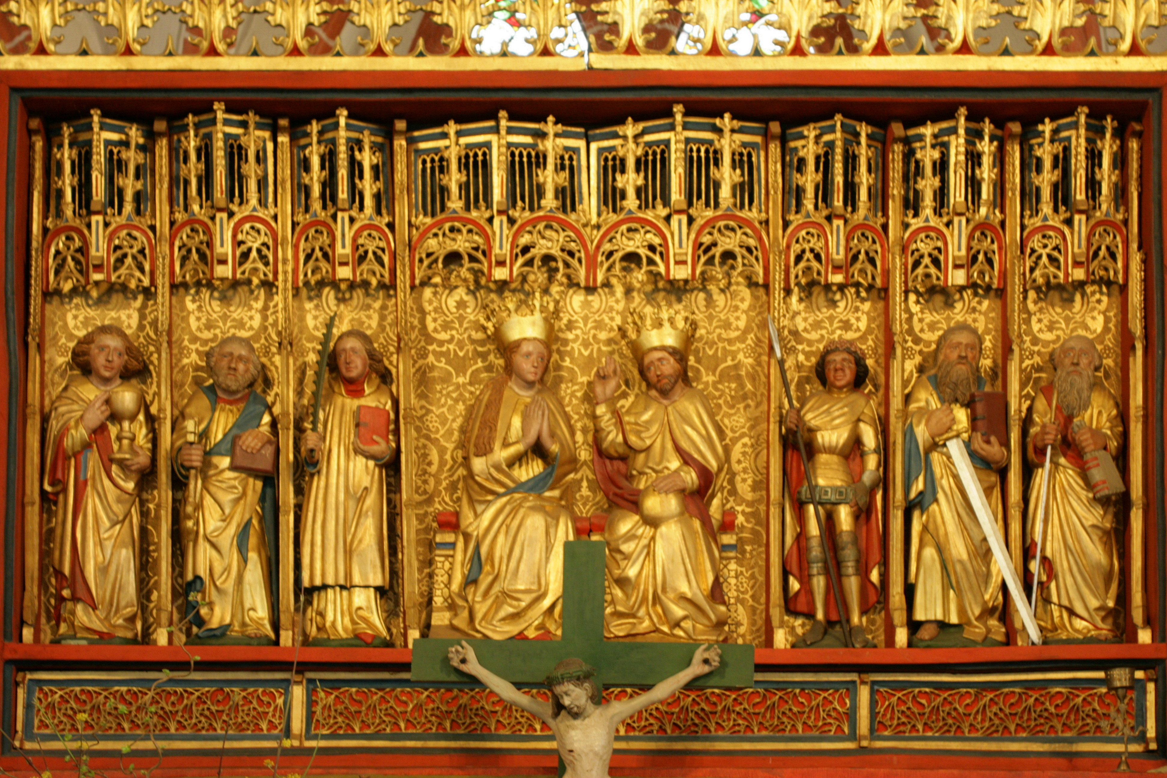 St. Georgskirche, Wriedeler Straße im Ortsteil Hanstedt I von Hanstedt (Landkreis Uelzen)